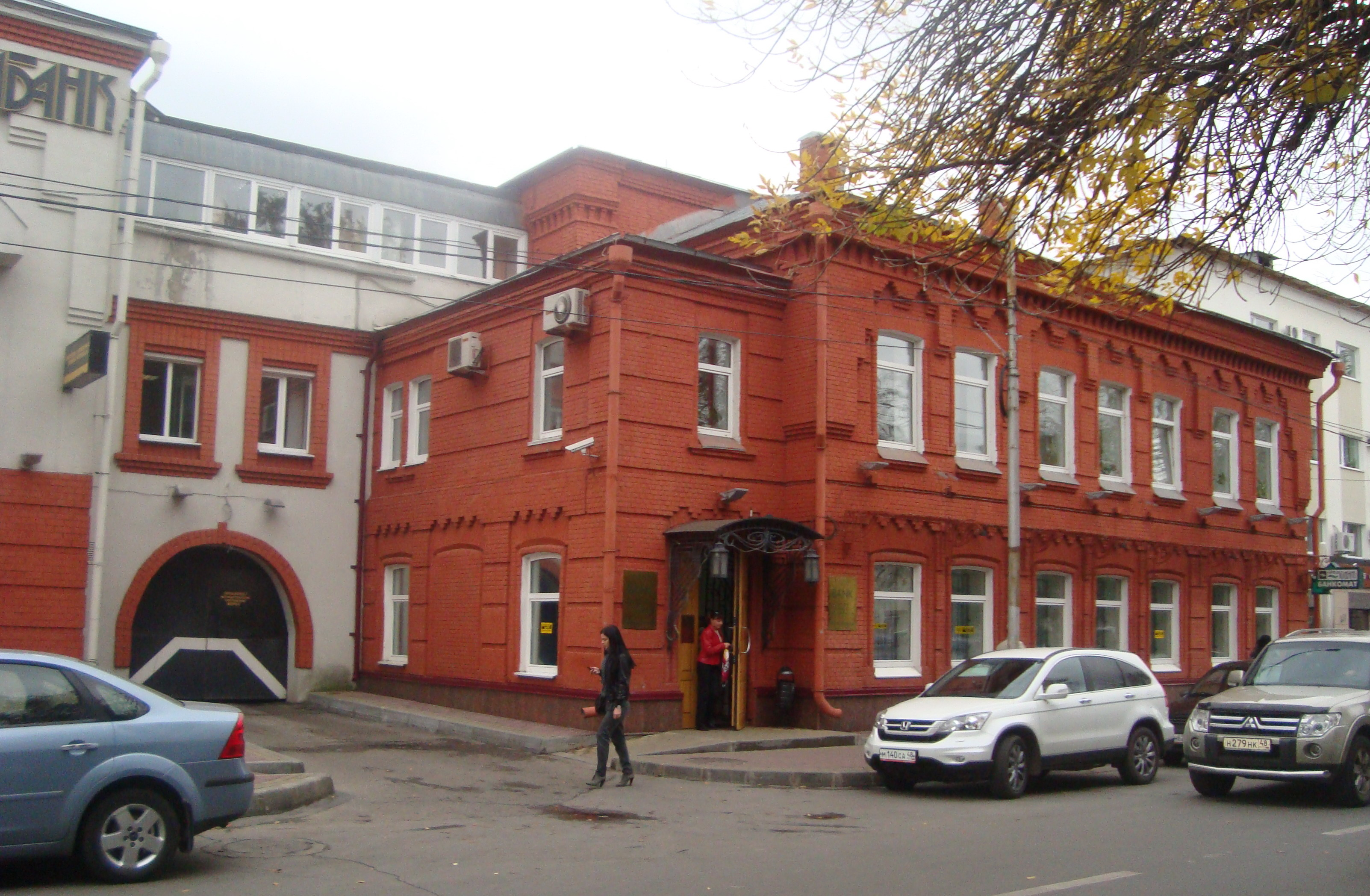 Липецк - Интернациональная ул.,8